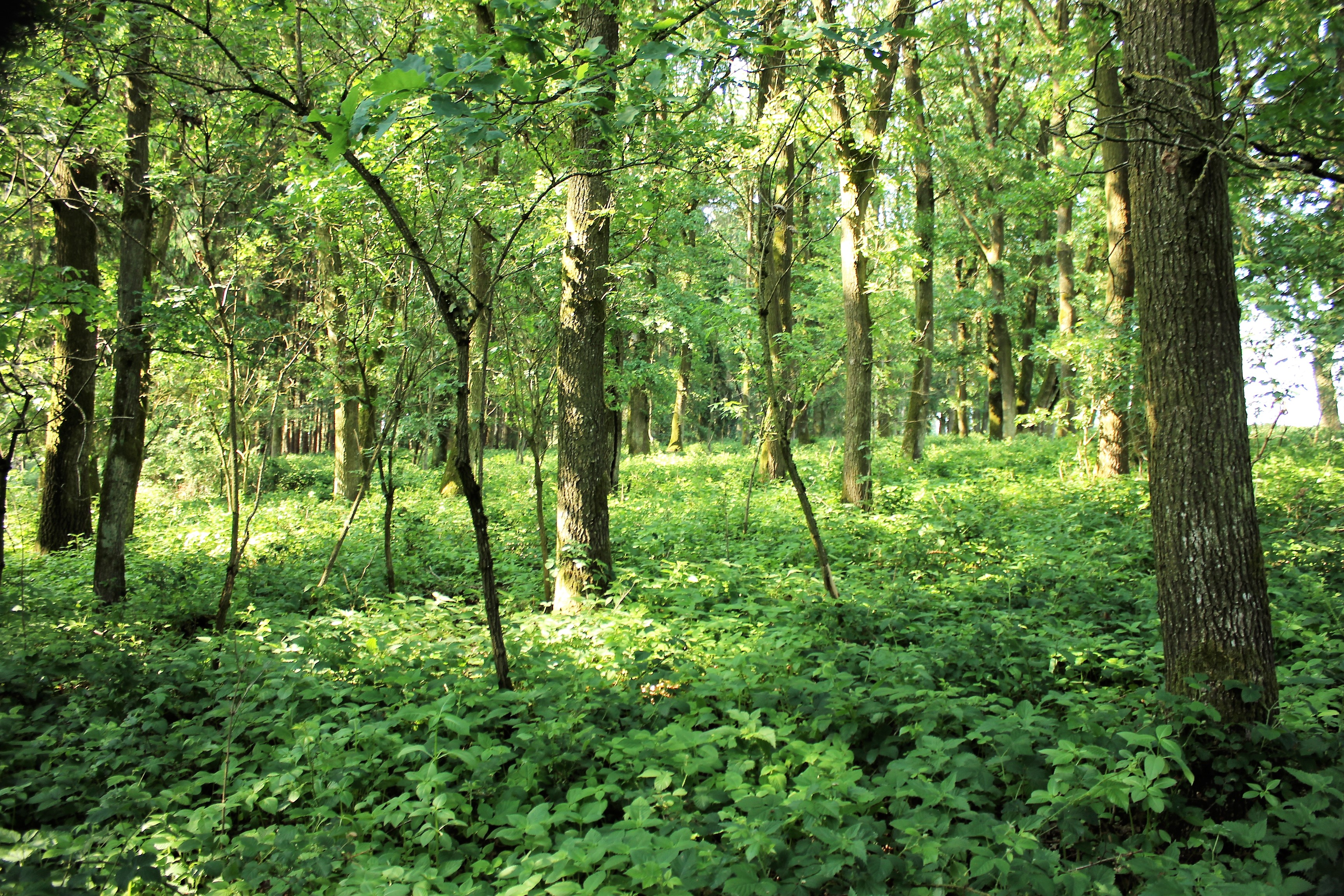 Landschaftsschutzgebiet "Dickerlberg bei Leiblfing" im Landkreis Straubing-Bogen. Das Schutzgebiet besteht seit 1981 und trägt die Nummer LSG-00323.02; WDPA: 395811